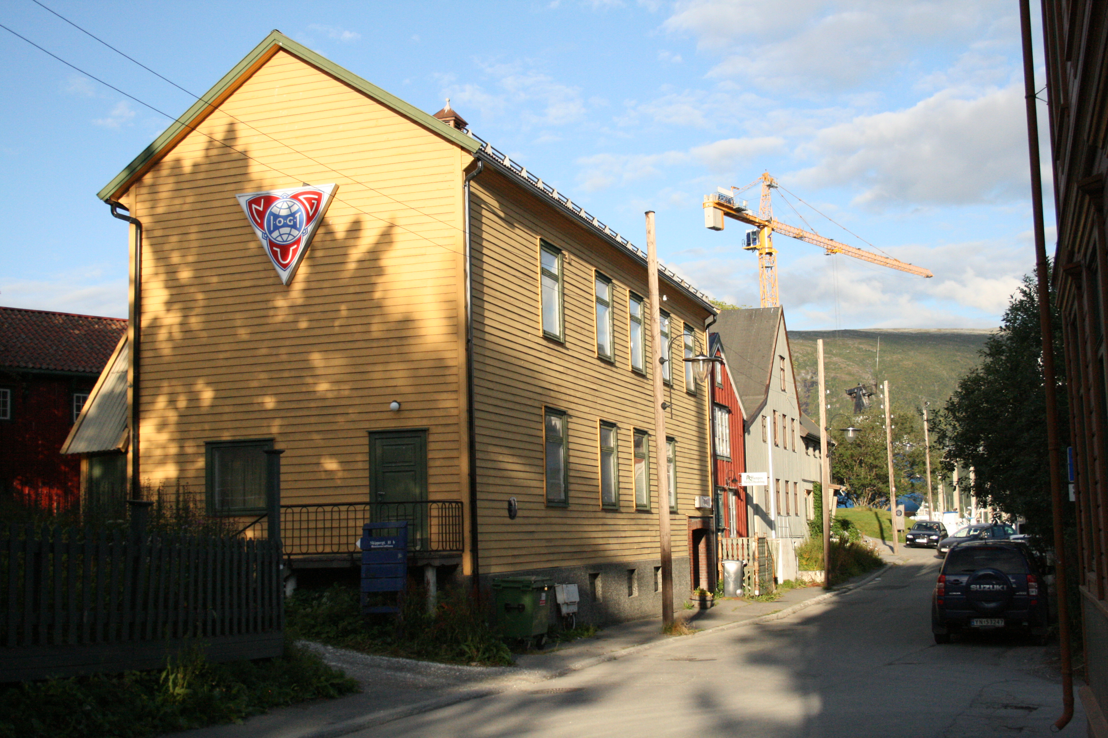 Godtemplarhuset (vanligvis omtalt som IOGT-huset) i Søndre Tollbodgate 2, Tromsø.